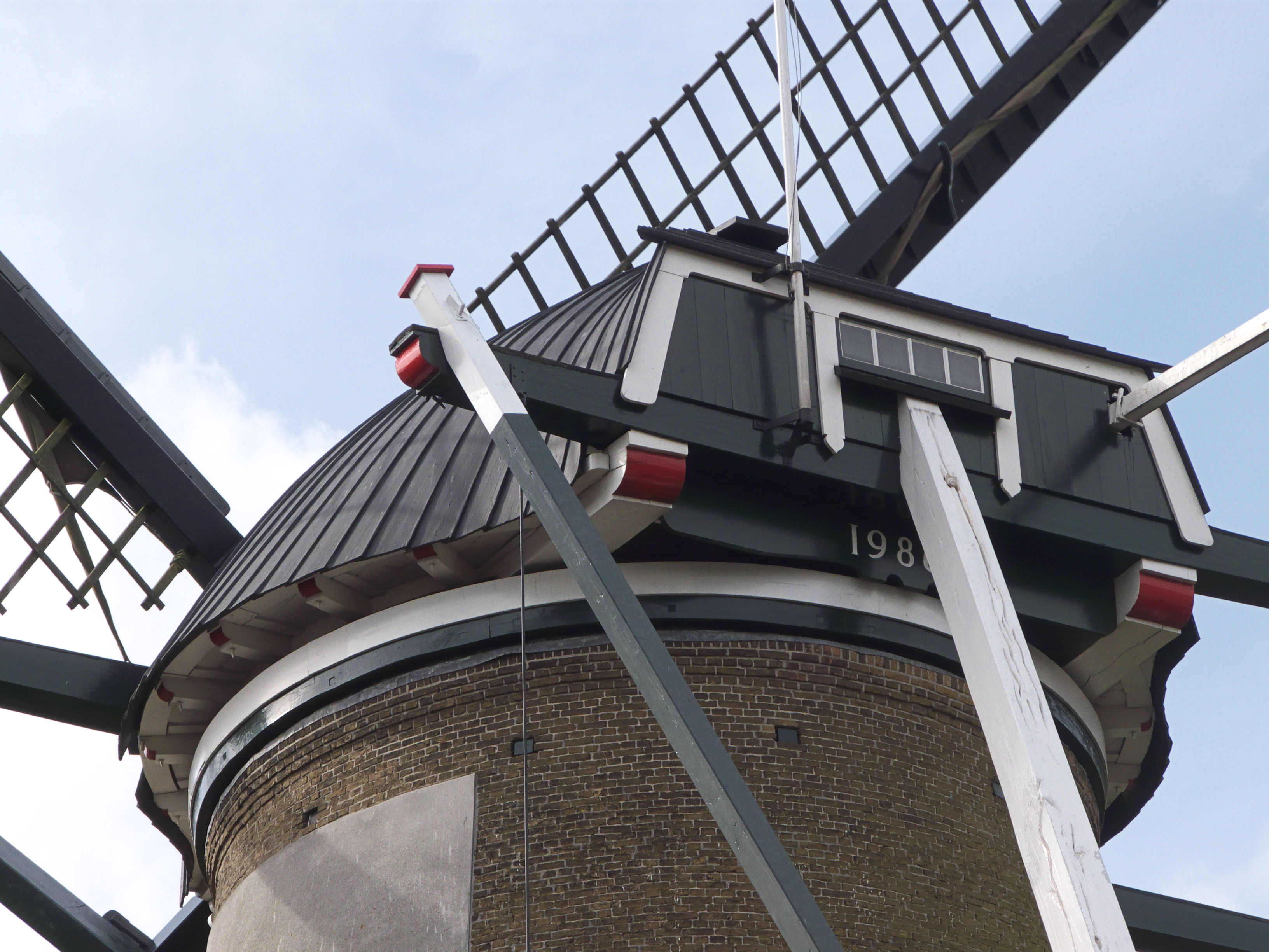 Molen Cothen\Molen Oog in 't Zeil, gepotdekselde kap, Cothen, Netherlands